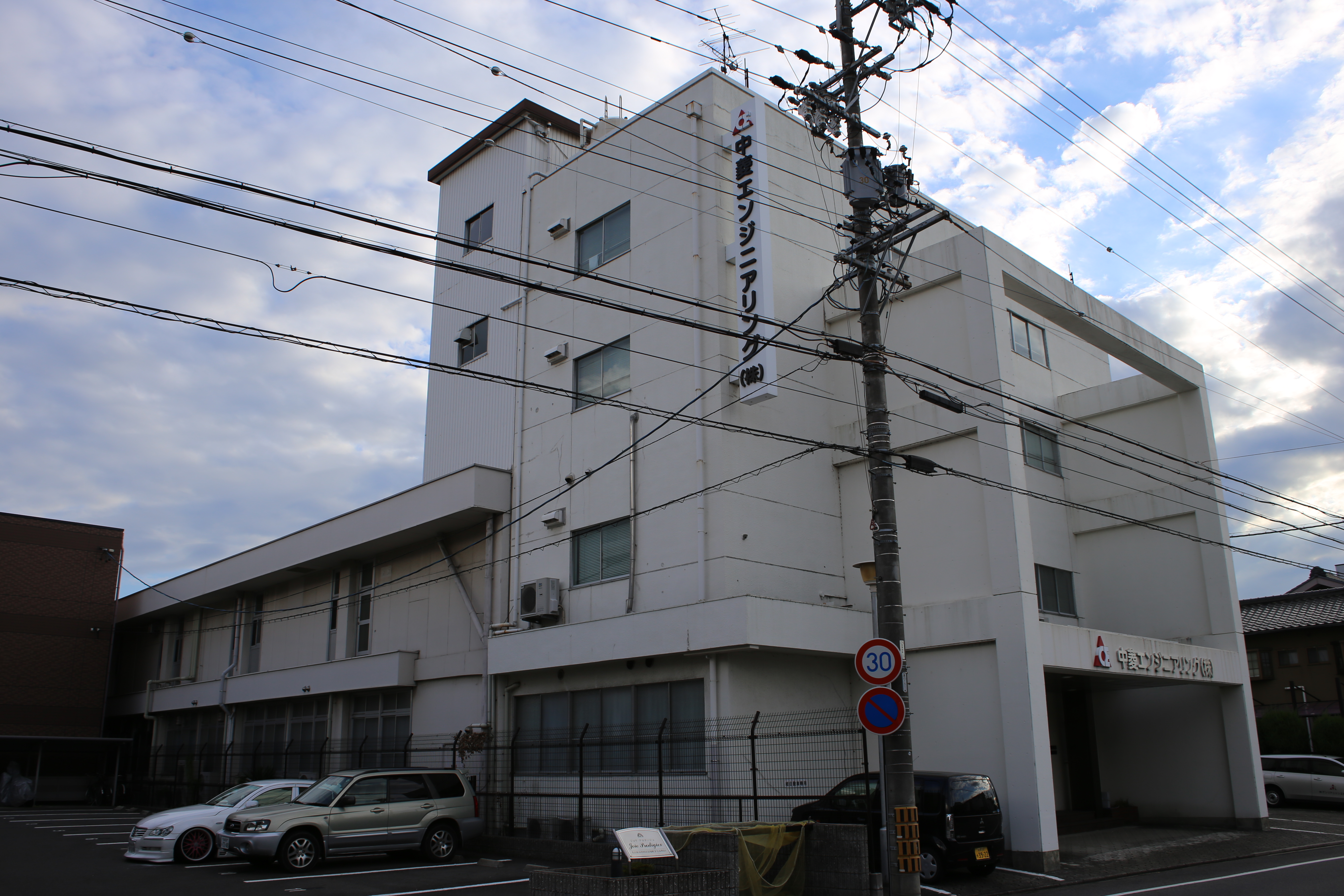 名古屋市中村区岩塚町字九反所の中菱エンジニアリング本社を北側公道東側より撮影